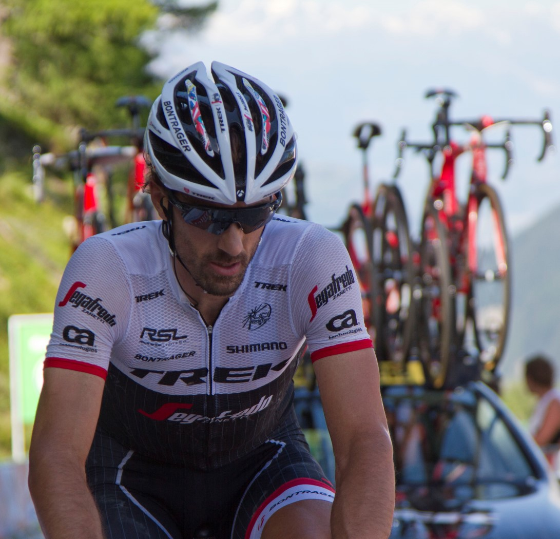 339 cancellara